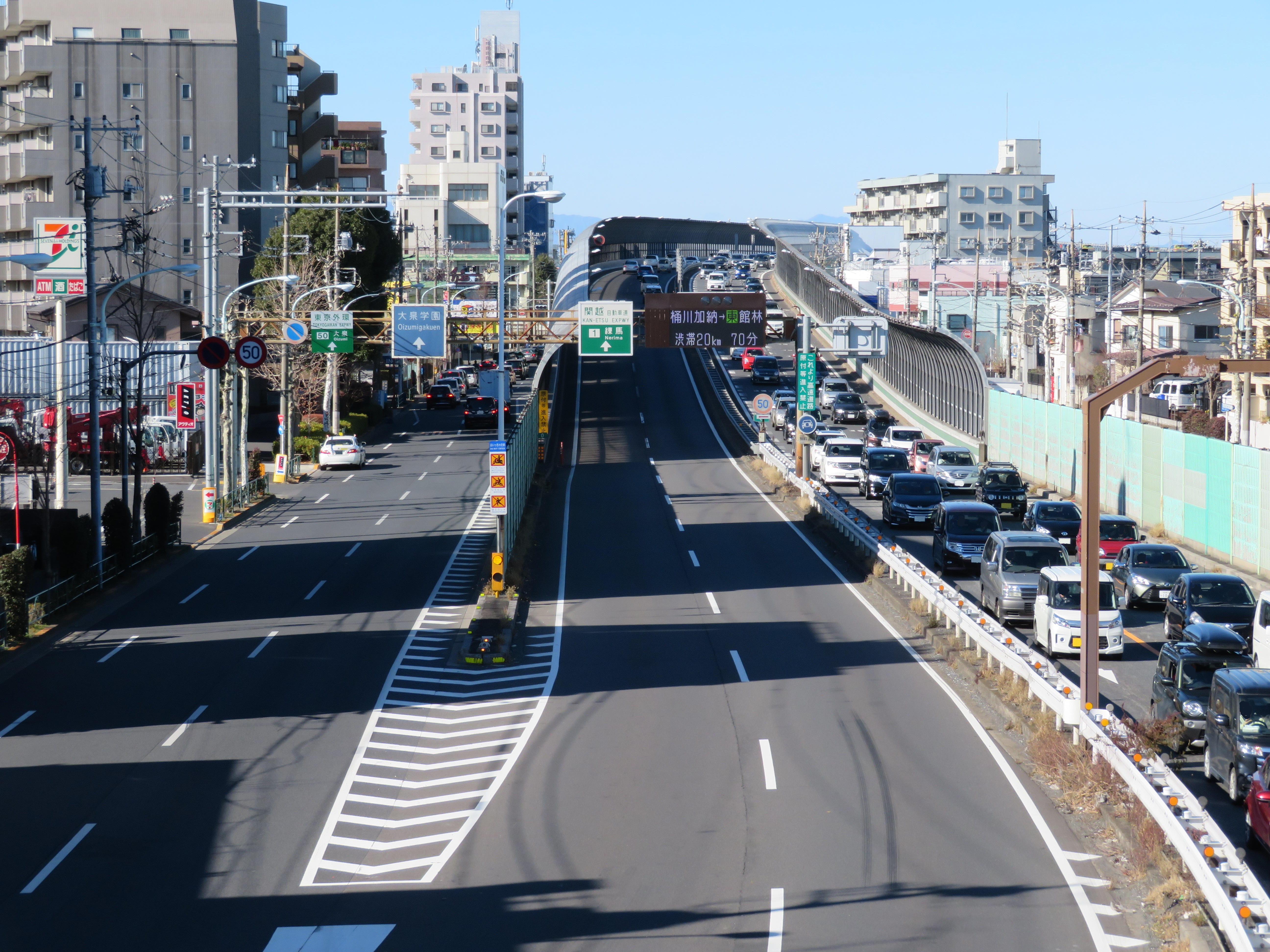 関越自動車道練馬IC出入口付近（大泉JCT方面を撮影）